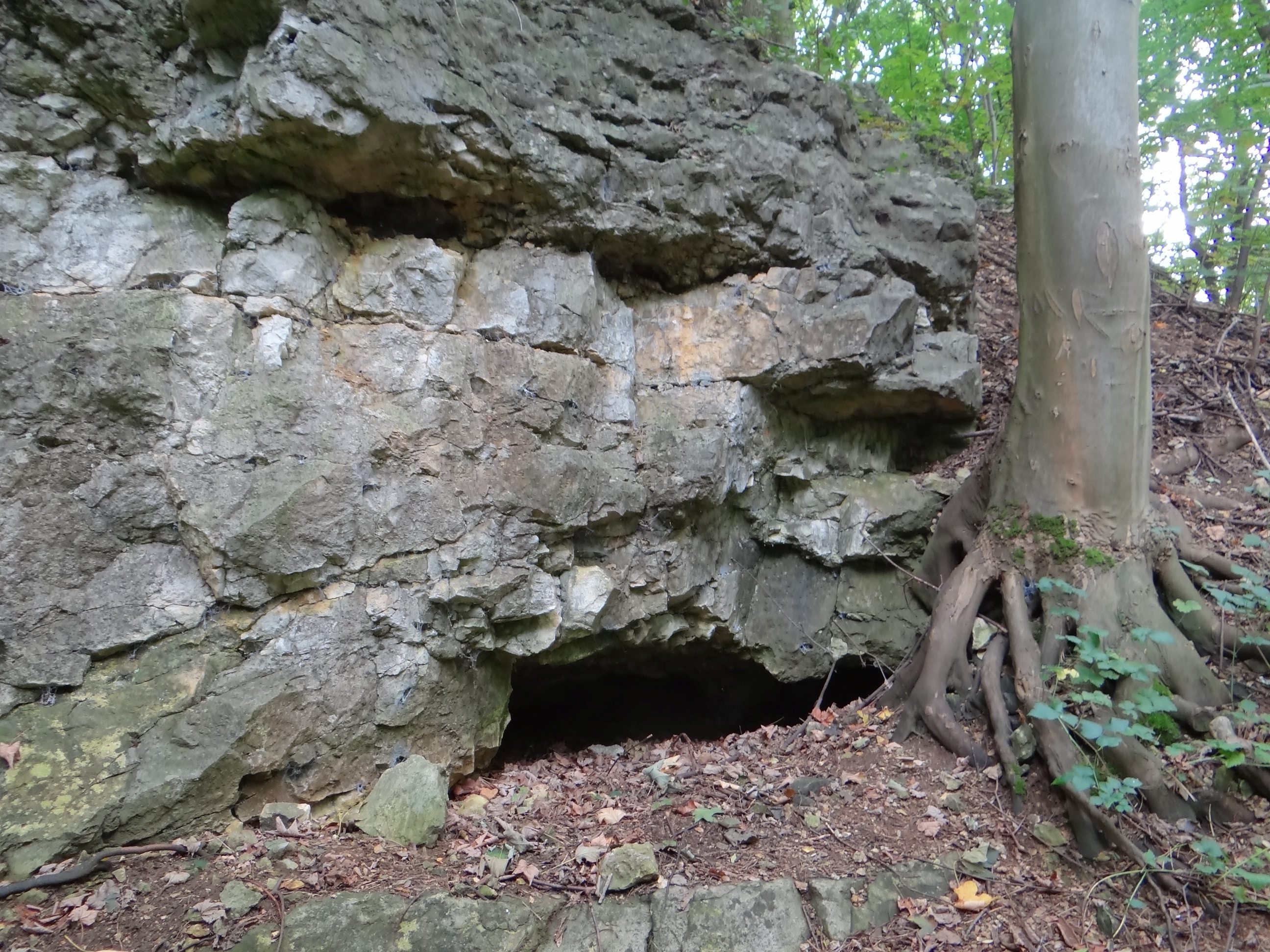 Jaskinia Wywiew na Zakrzówku w Krakowie